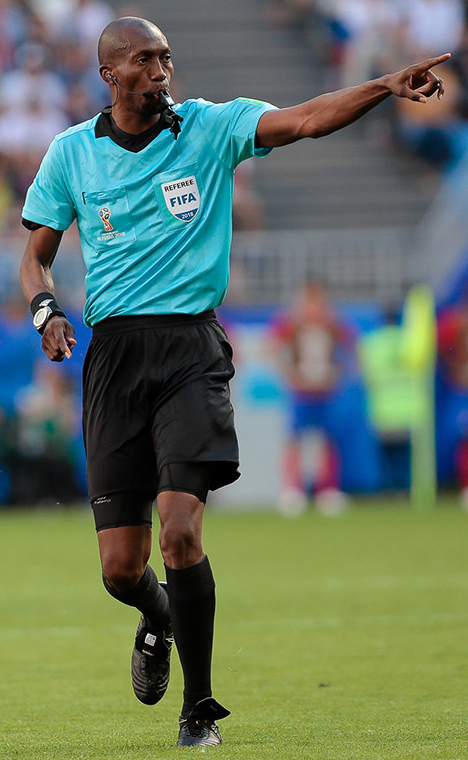 Сербская куча мала в Самаре: непростая победа над Коста-Рикой